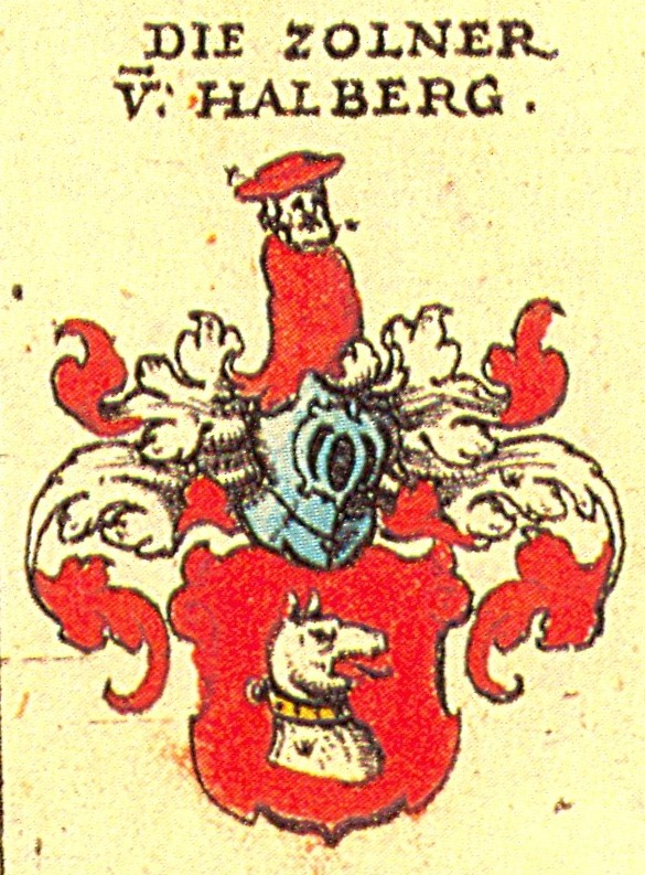 Wappen der Fränkischen Adelsfamilie Zollner von Halberg